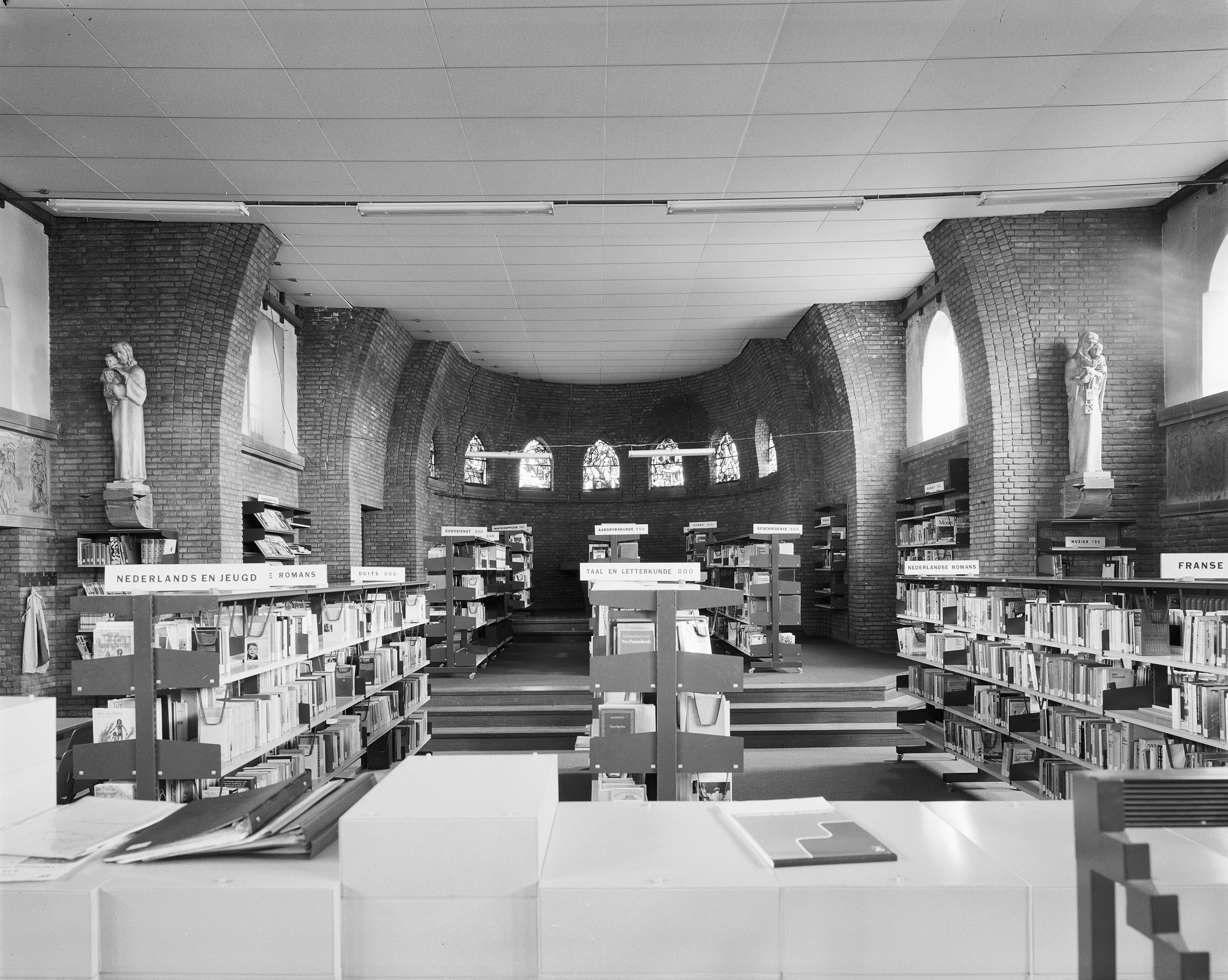 CARMELLYCEUM: INTERIEUR, OVERZICHT KAPEL